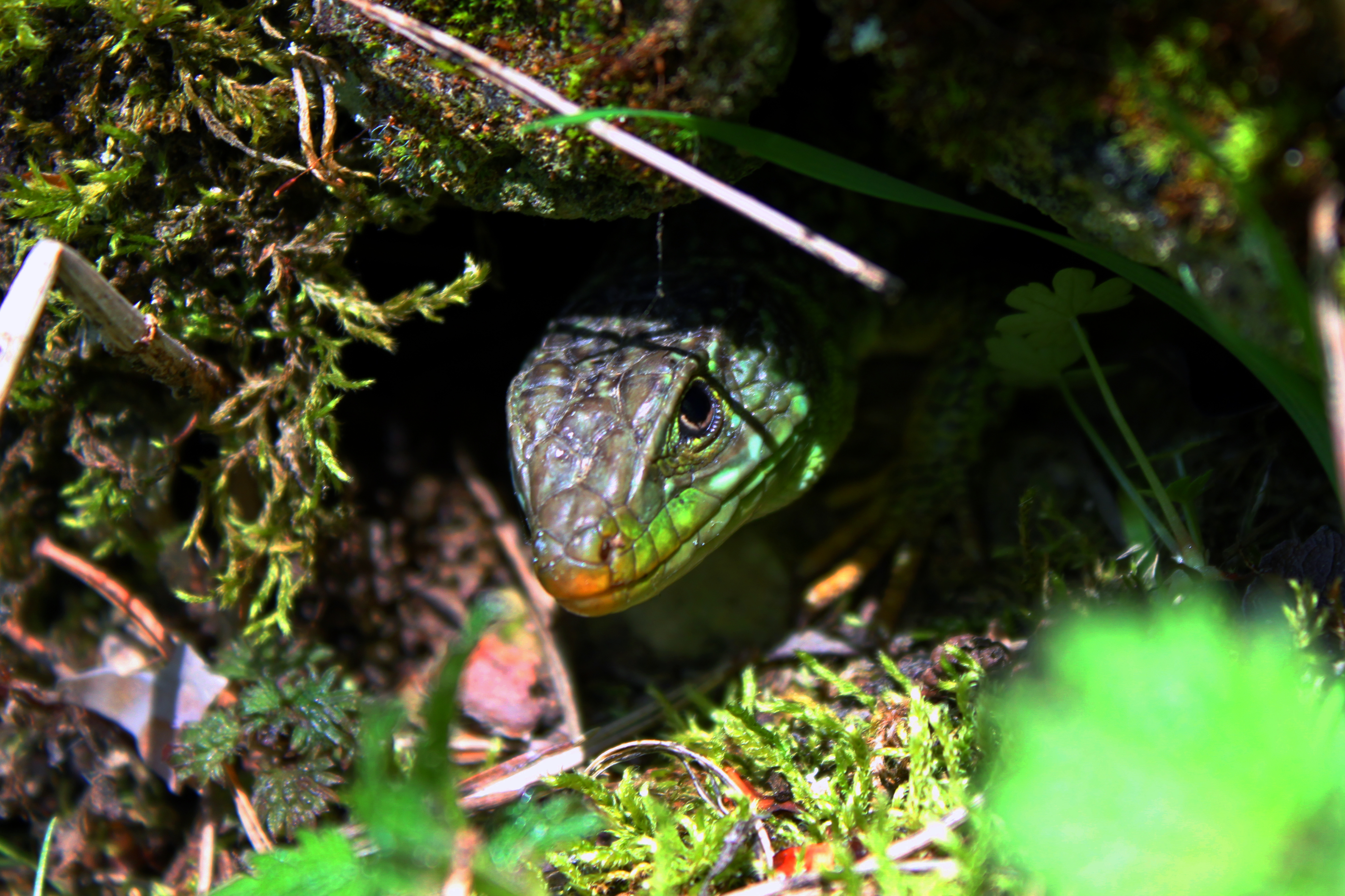 Timon lepidus asomando a través de una grieta en el paraje de Los Callejones de Las Majadas, provincia de Cuenca, Castilla-La Mancha, España.